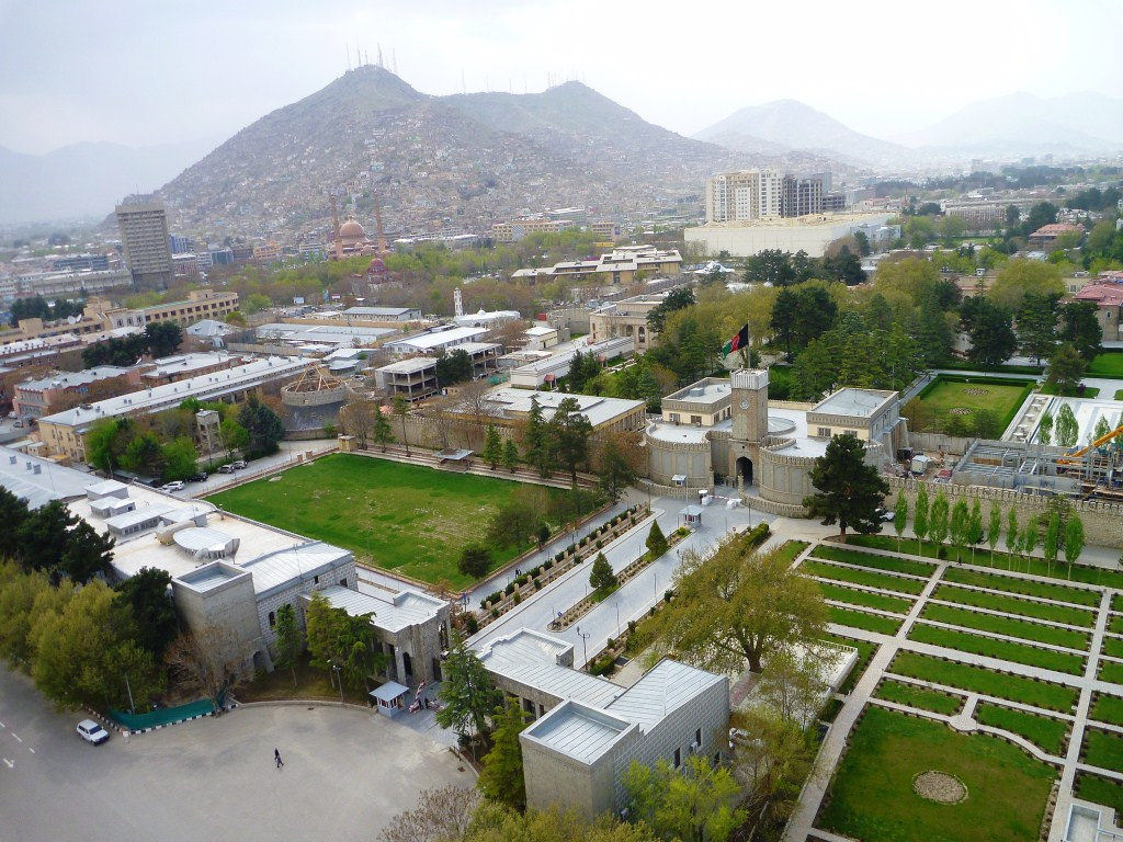 Presidential Palace